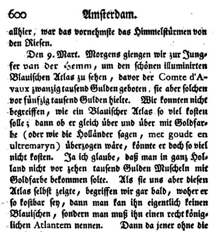 Ausschnitt aus: Zacharias Konrad von Uffenbach: Herrn Zacharias Conrad von Uffenbach Merckwürdige Reise durch Niedersachsen Holland und Engelland. auf Kosten Johann Friedrich Gaum, 1754, S. 600